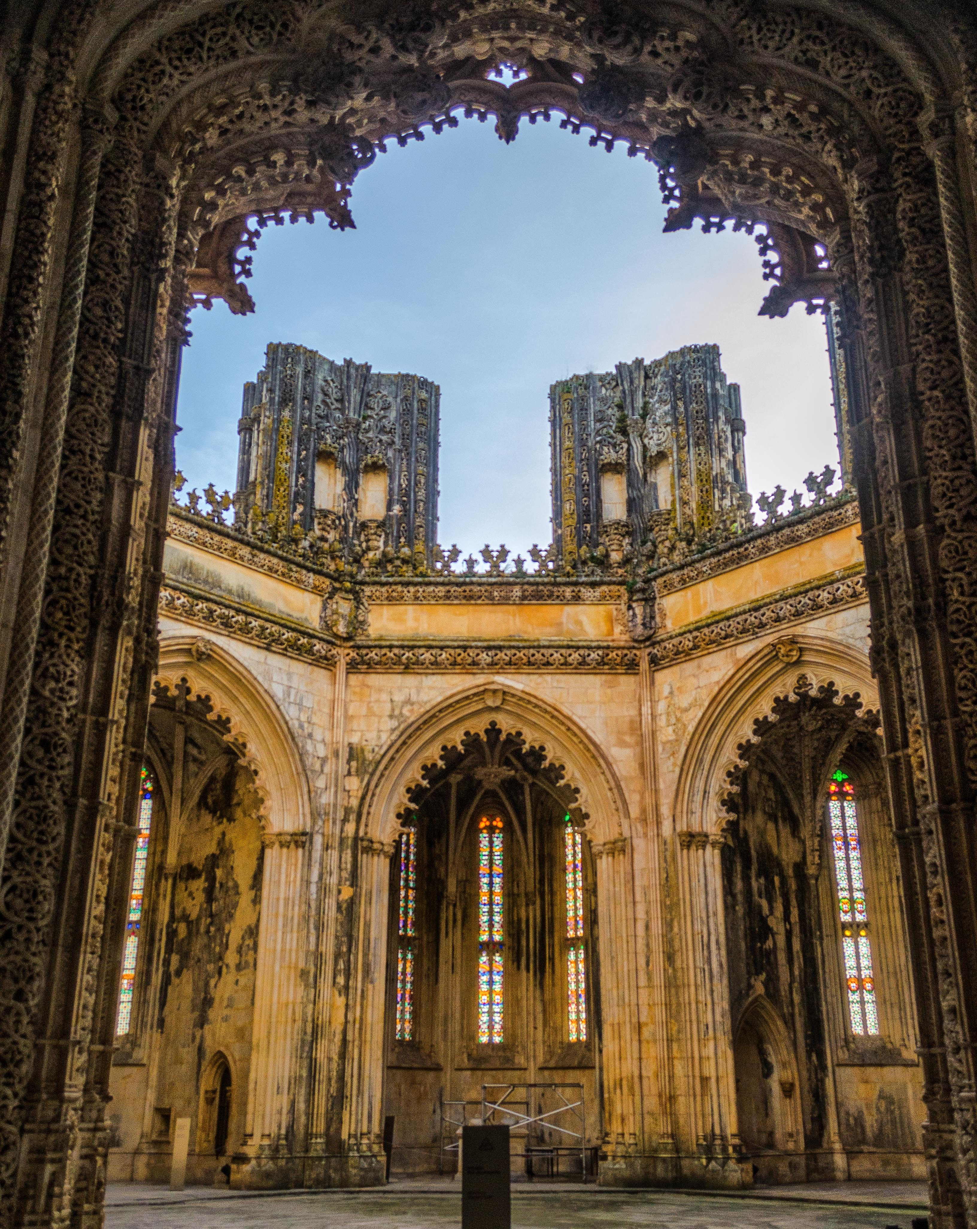 Una de las joyas del arte manuelino y Unesco World Heritage